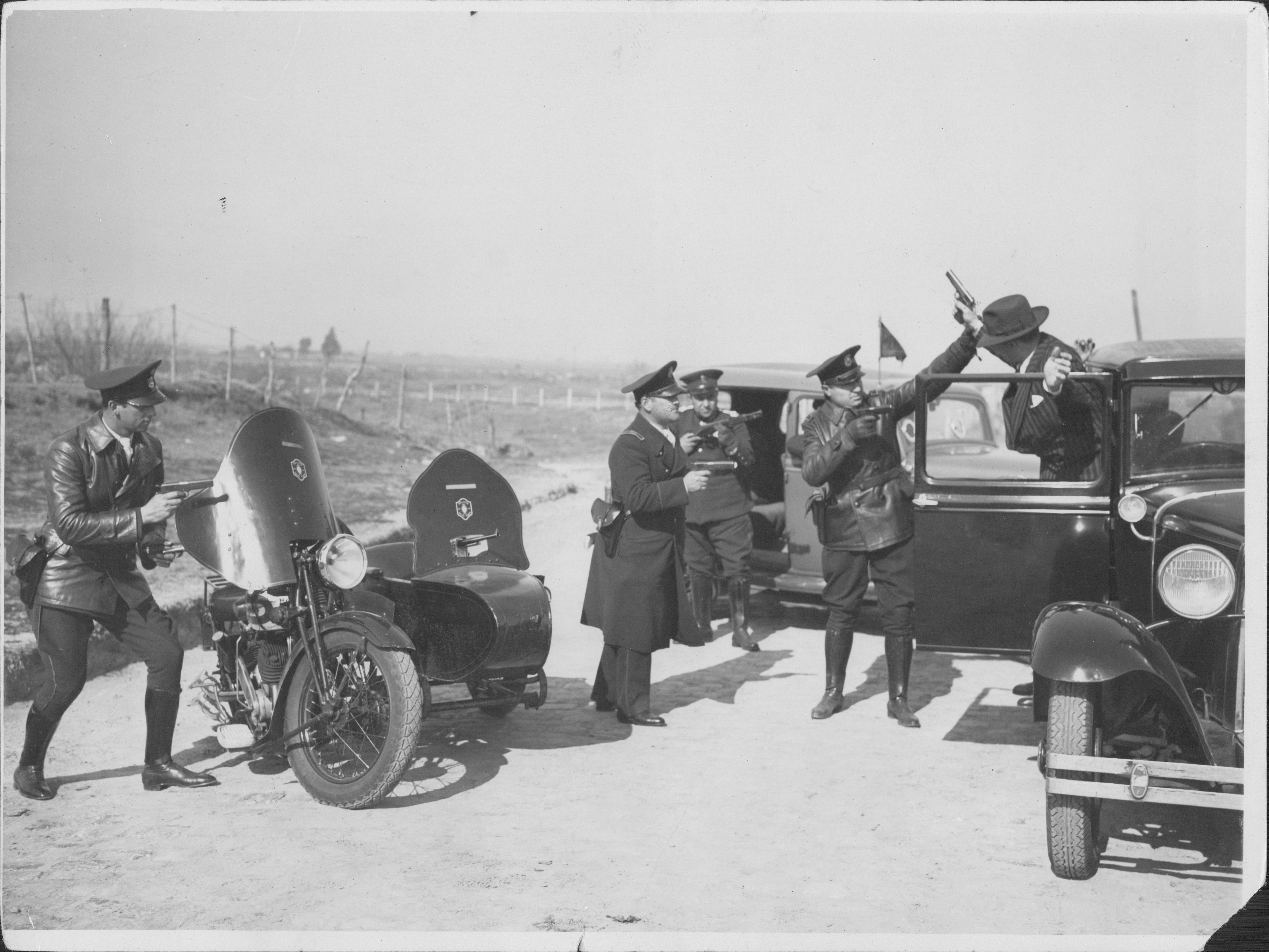 Operativo policial en el conurbano, Buenos Aires 1934. Inventario 301143 General Archive of the Nation Native nameArchivo General de la Nación ArgentinaParent institutionPoder Ejecutivo Nacional LocationBuenos Aires, ArgentinaCoordinates34° 36′ 17″ S, 58° 22′ 14″ W Established28 August 1821Web pageAGNAuthority control : Q2860529 VIAF: 158621023 ISNI: 0000 0001 2375 5869 LCCN: n82144709 NKC: kn20121211004 WorldCat institution QS:P195,Q2860529 This file, was provided to Wikimedia Commonsthanks to an agreement between the General Archive of the Nation of Argentina and Wikimedia Argentina.